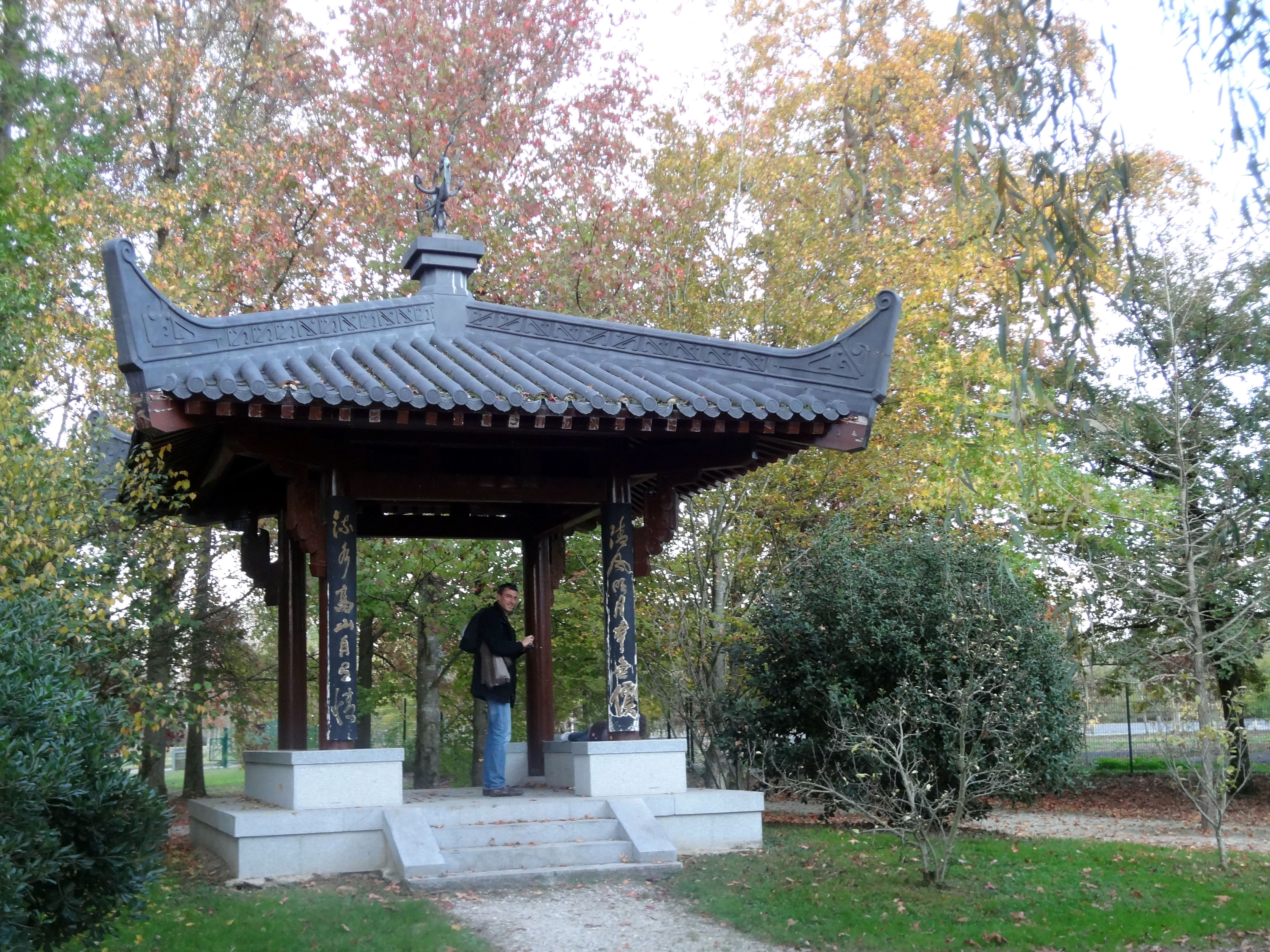 Parc floral de Bordeaux